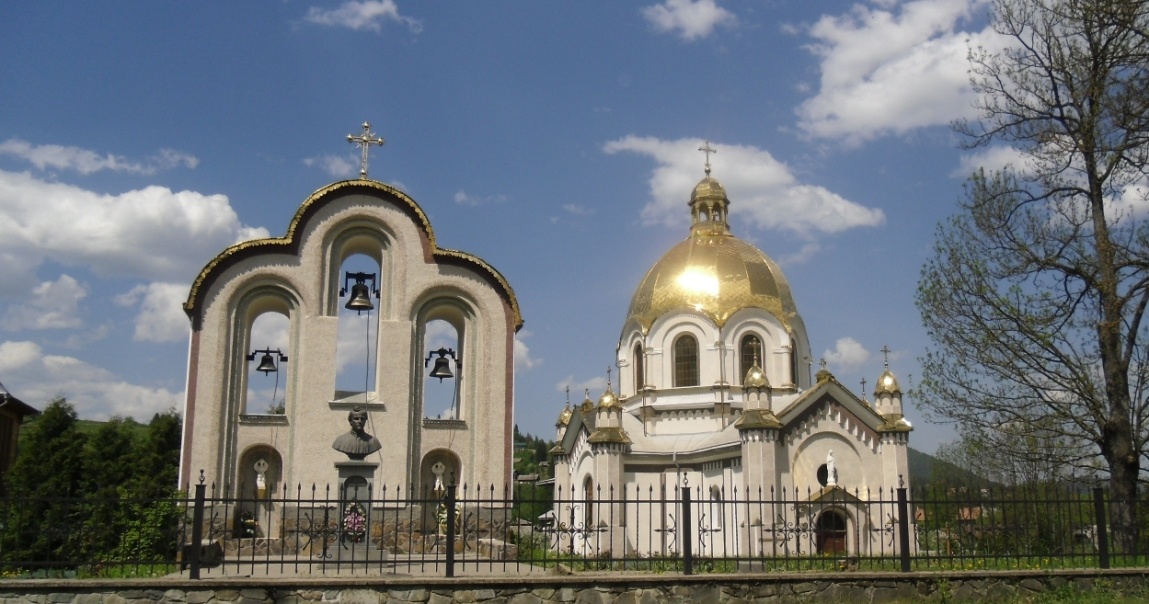 Славське._Церква_Успення_Пресвятої_Богородиці_(1901).: смт. Славське